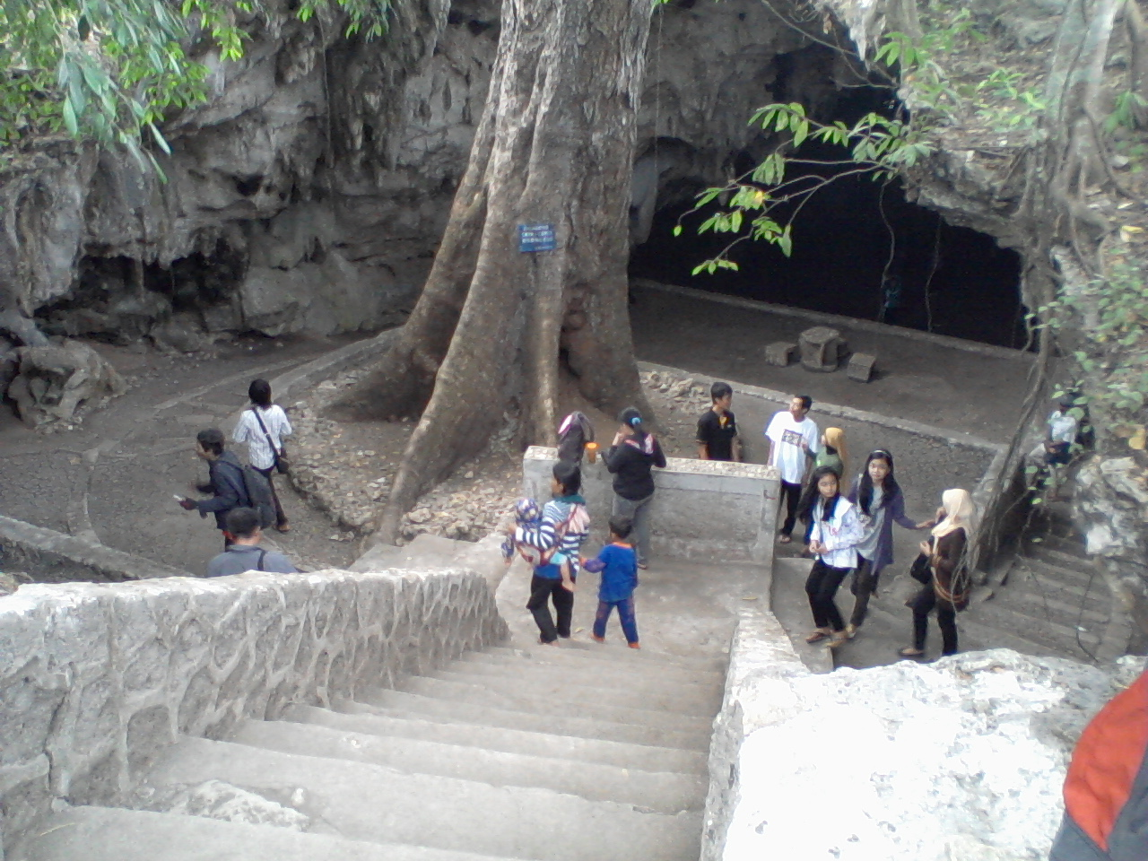 Gua Rancang Kencono dari atas